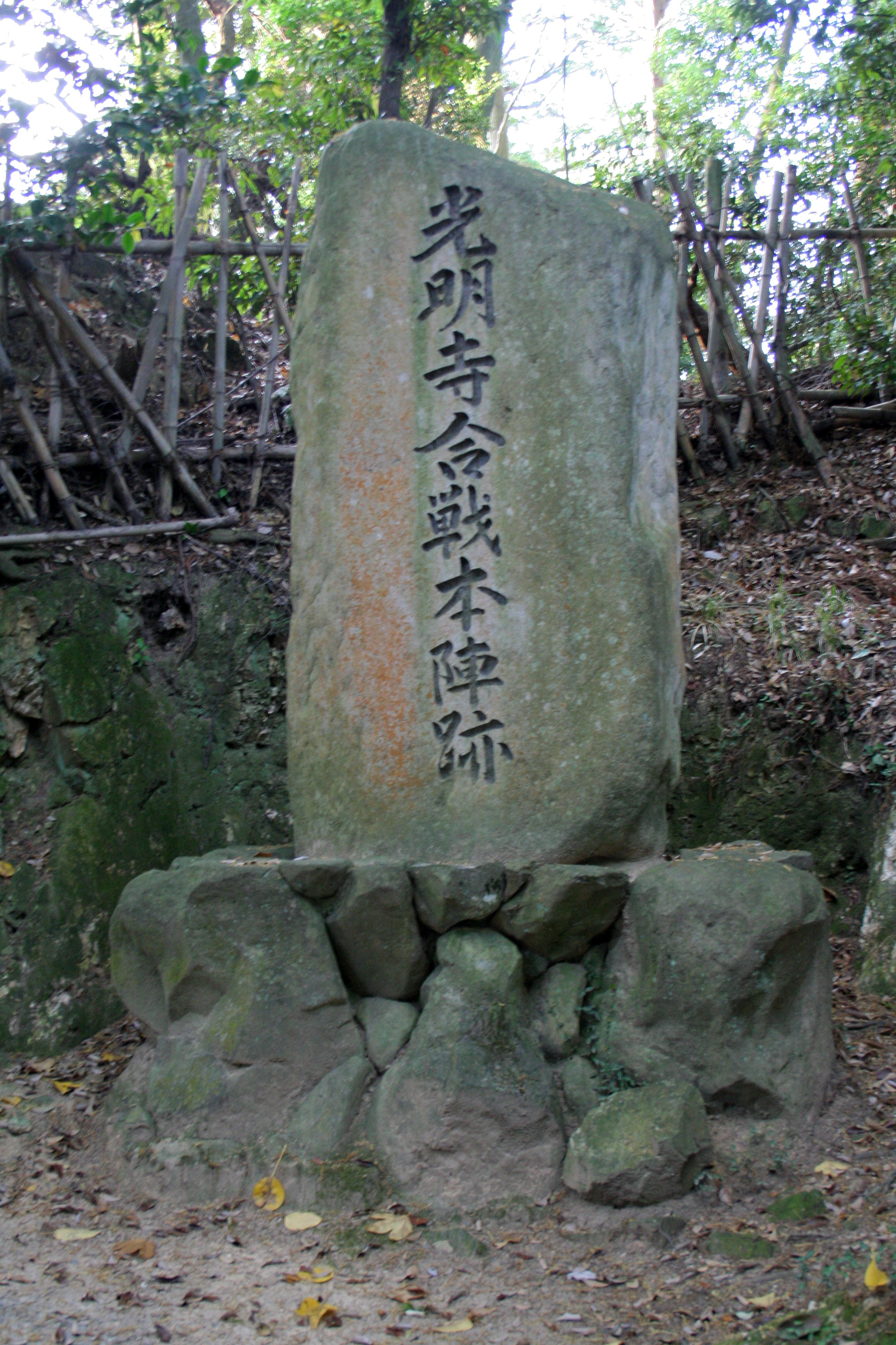 兵庫県加東市にある仏教寺院。光明寺。 光明寺合戦本陣跡にある石碑。